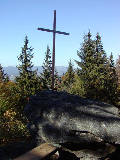 Das Gipfelkreuz am Grandelberg; Fotograf: VA Freyung; bearbeitet durch ttog